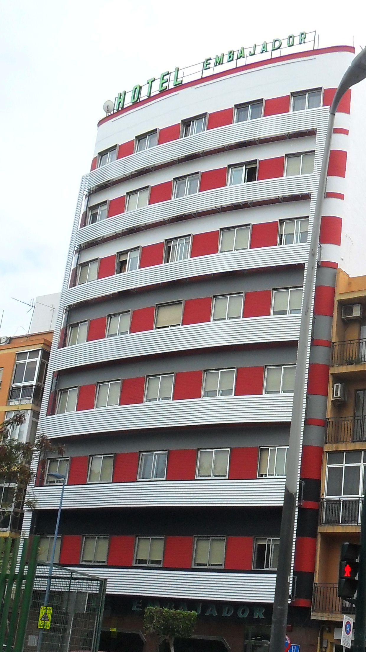 Hotel Embajador en Almería tras su reforma exterior en 2018